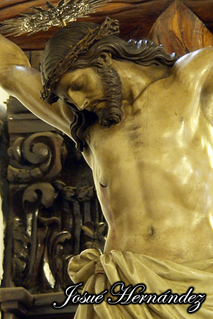 Santísimo Cristo de la Sala Capitular. 1828 Fernando Estévez de Salas (1788-1854) Catedral de Nuestra Señora de los Remedios, San Cristóbal de La Laguna. Tenerife